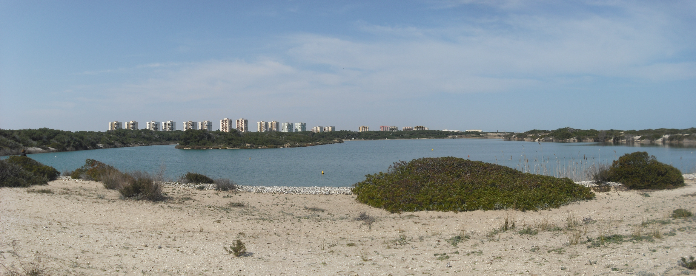 Vista del llac artificial del Saler, a prop de la Gola de Pujol.